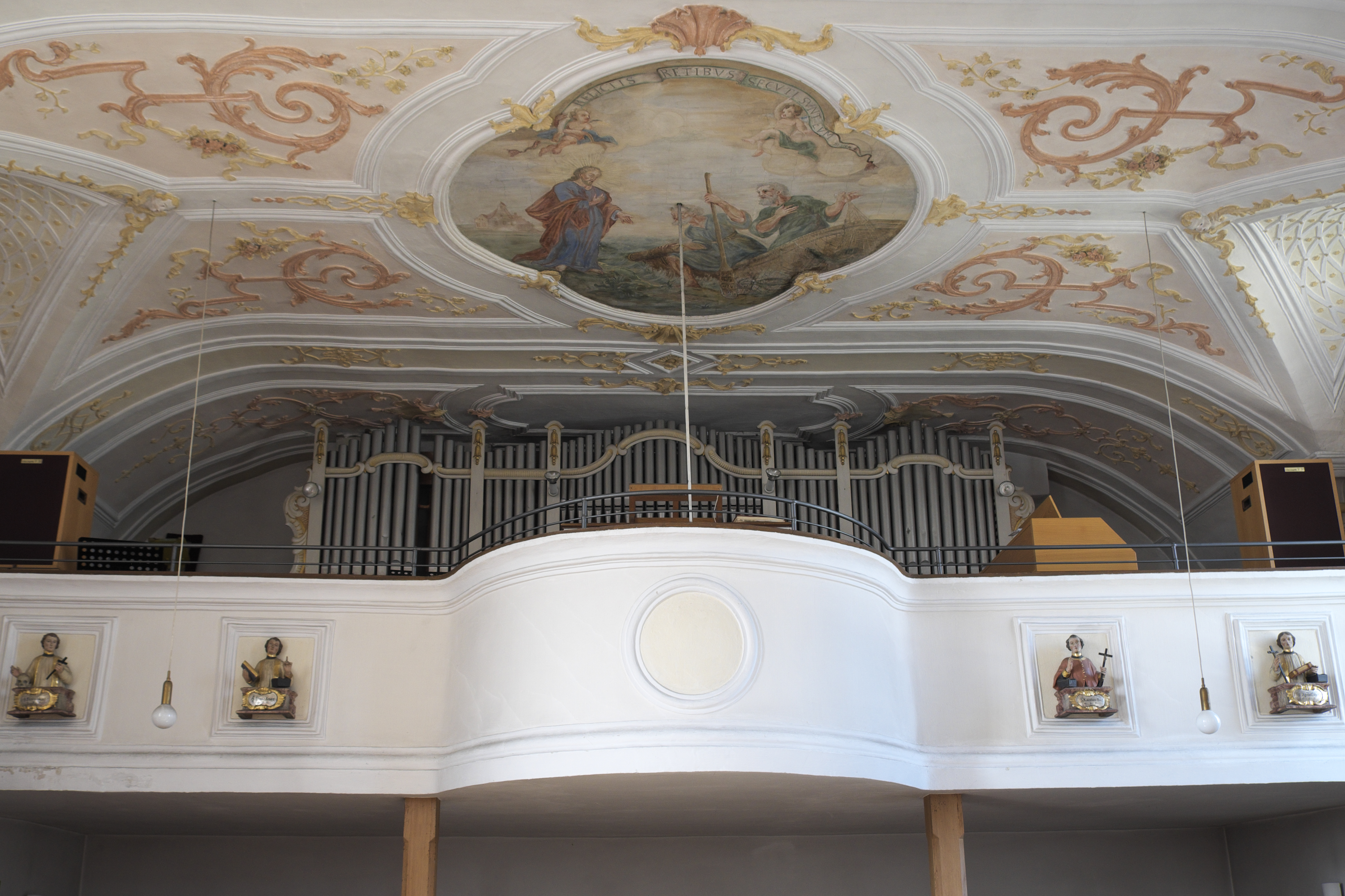 Alte katholische Pfarrkirche St. Andreas in Eching im Landkreis Freising (Bayern/Deutschland), Orgelempore, Deckenstuck im Stil des frühen Rokoko, Deckenmalerei mit der Darstellung der Berufung des Apostels Andreas